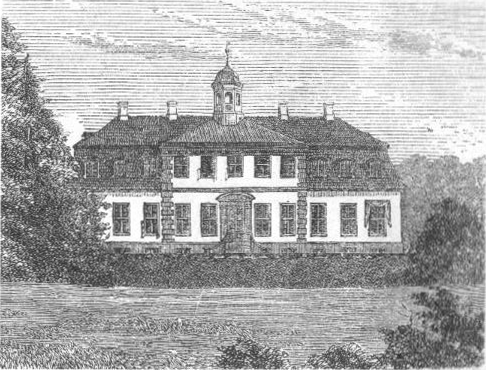 Sorgenfri Slot ved Lyngby. Opført i Begyndelsen af forrige Aarhundrede. I sin Tid Enkedronning Caroline Amalies Sommerresidens.